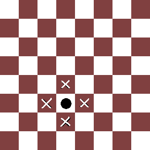 Ritmomàquia: moviment de la peça circular